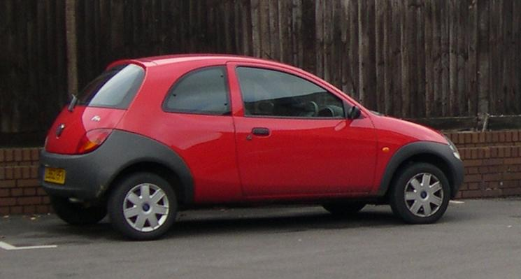 Ford Ka